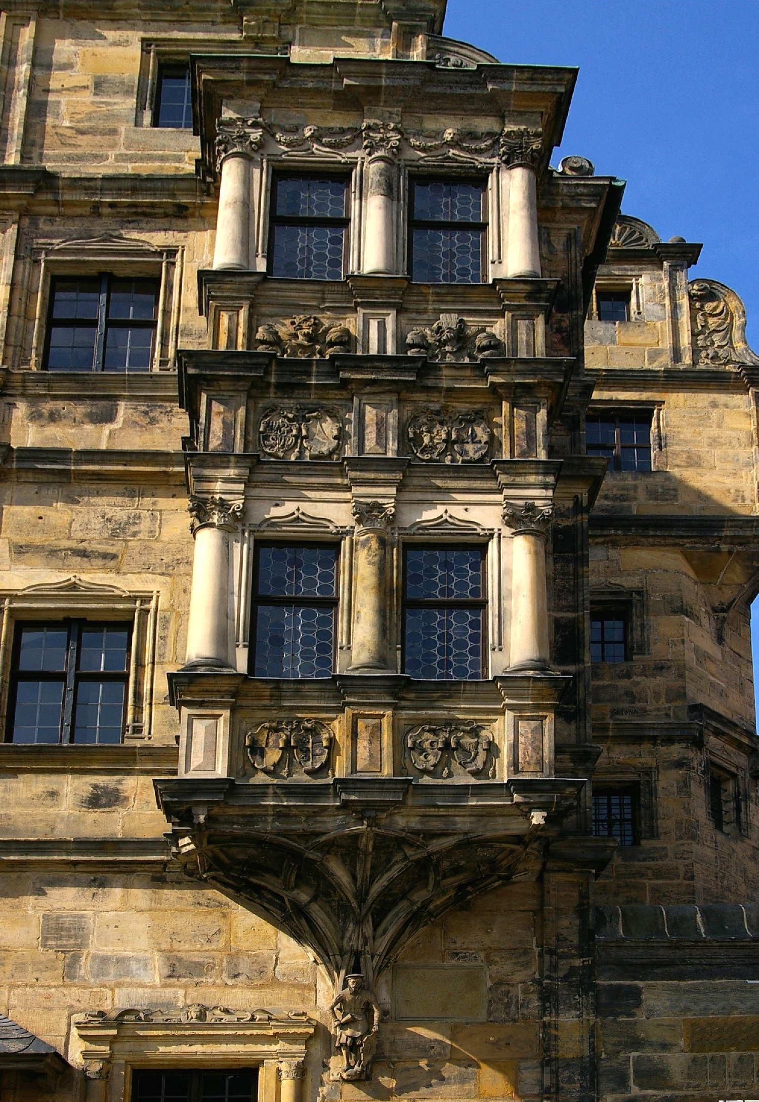 Bamberg - Alte Hofhaltung - Erker